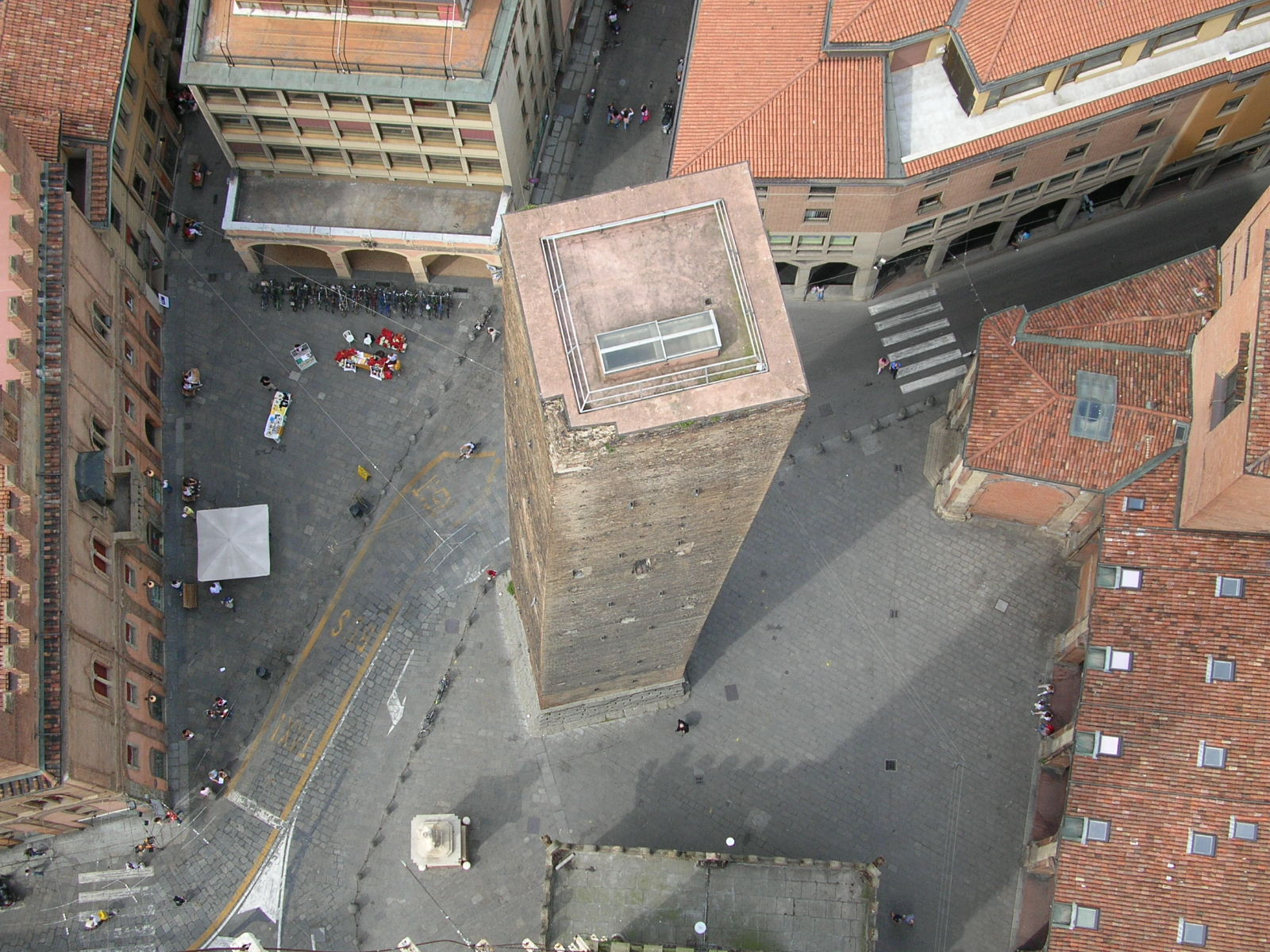 foto del raduno wikipedia bologna 2006 - Vista dall'alto della Torre degli Asinelli: la Torre della Garisenda e piazza di Porta Ravegnana.